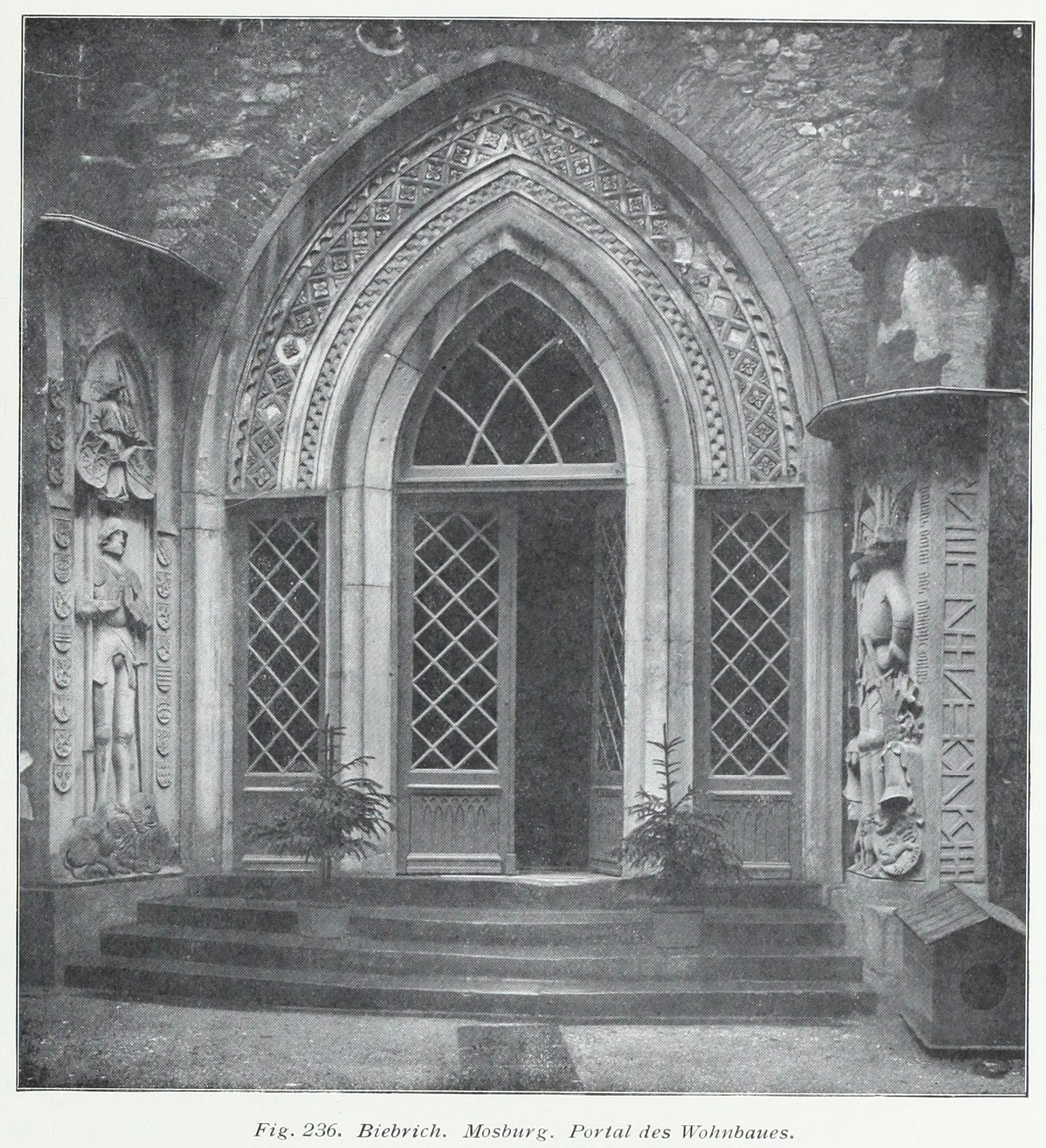 Biebrich Mosburg Portal des Wohnbaues